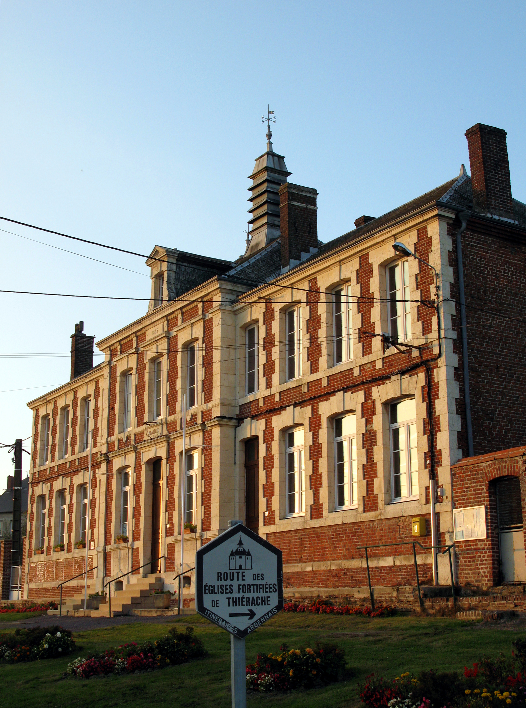 Mainbressy, village de la commune de Rocquigny (Ardennes, France) - La mairie, près de laquelle est dressé un panneau signalant le circuit touristique des églises fortifiées de la Thiérache ardennaise.